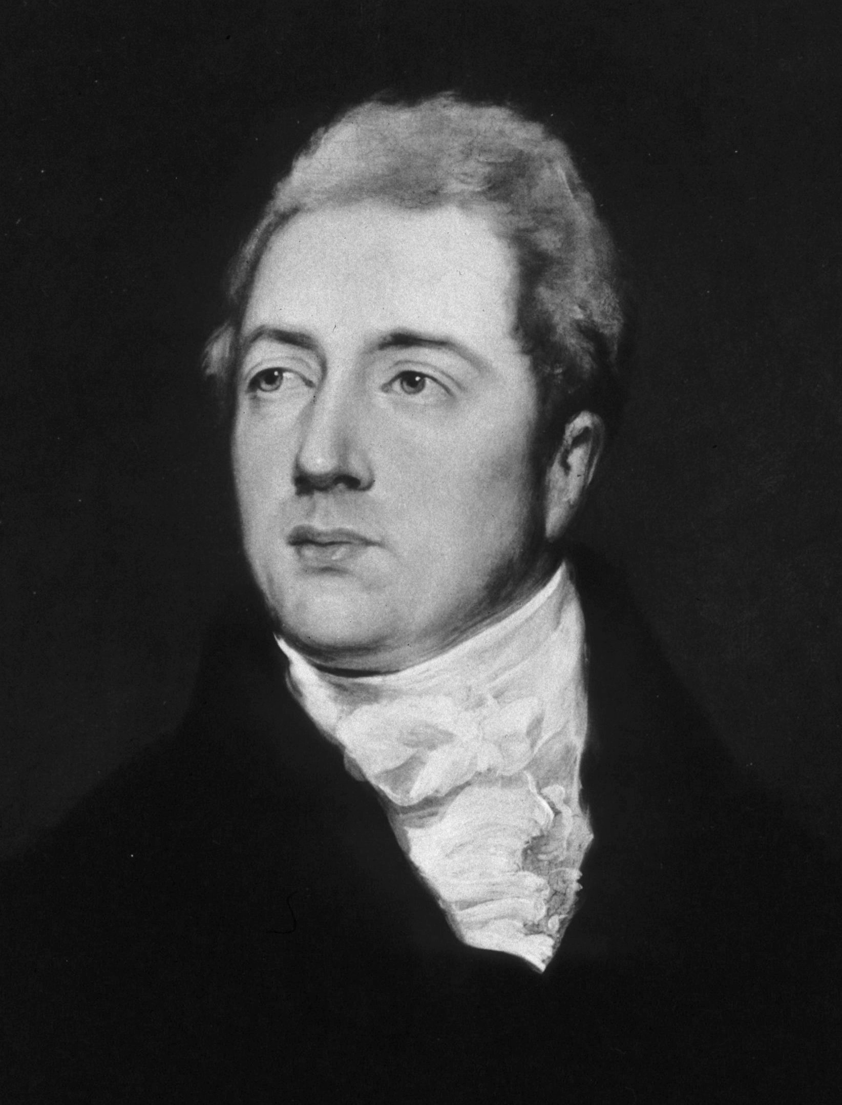 Yelloly, John (1774-1842)